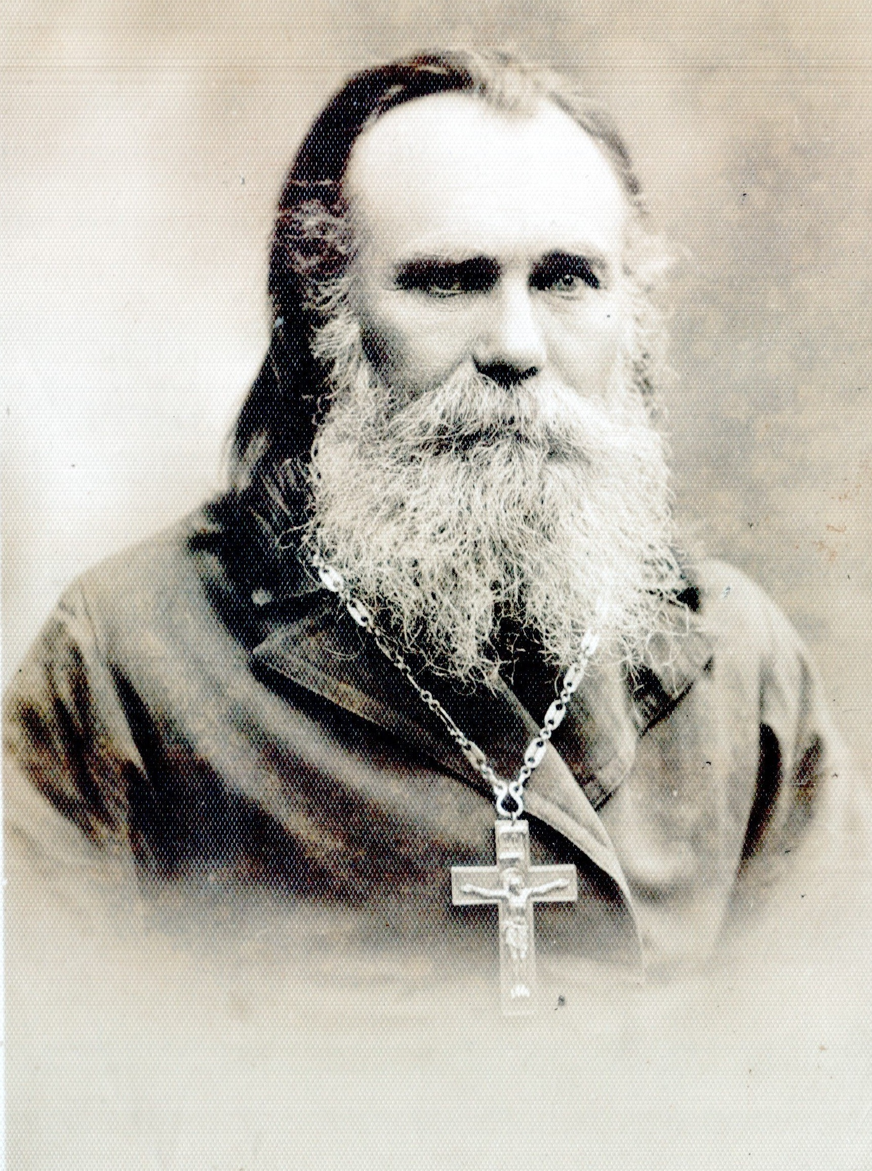 Світлина отця Даниїла Шумського датована 1908 роком